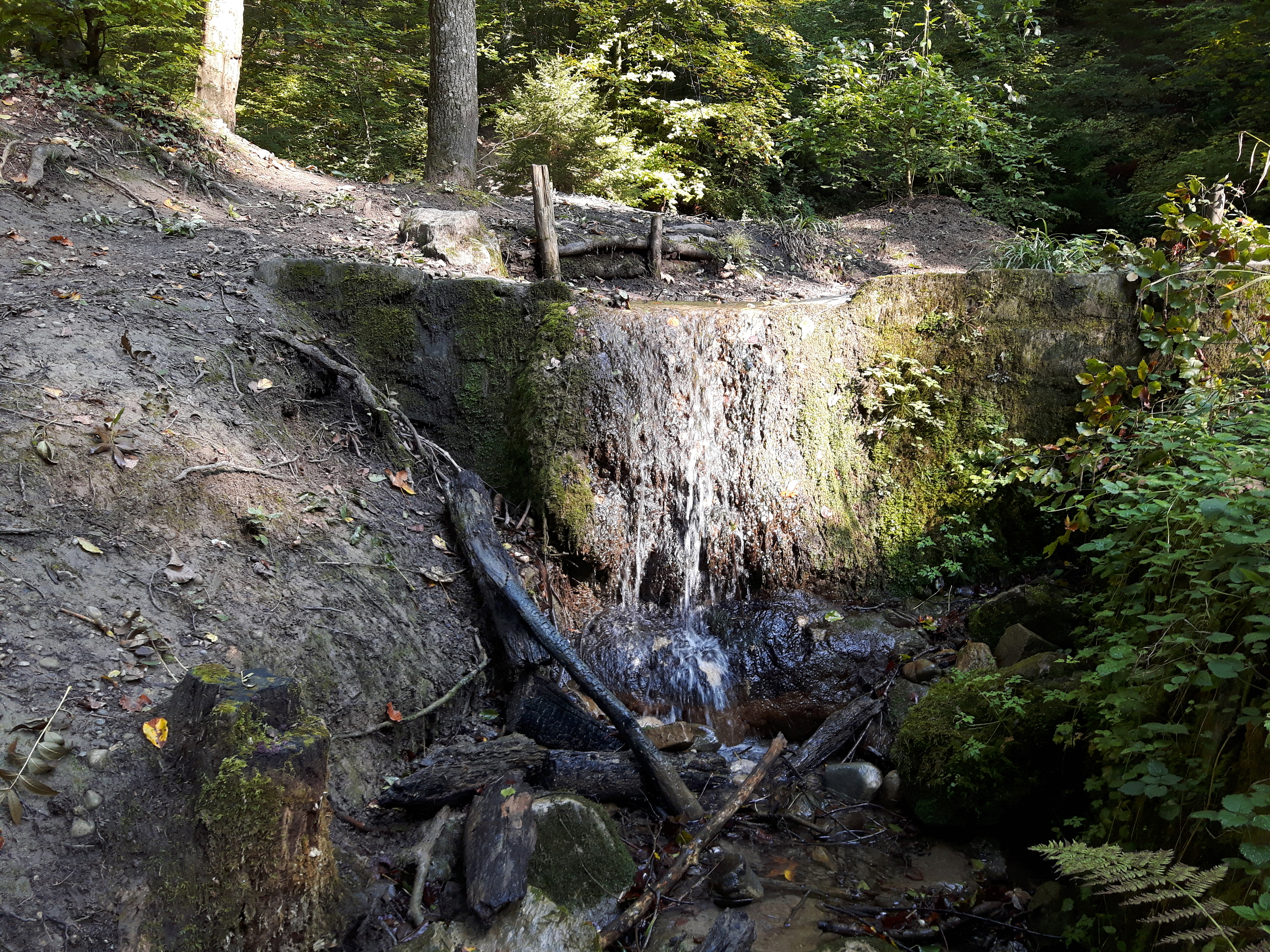 Weidtobelbach vor Mündung in den Fürtlibach im Loch zwischen Oberengstringen (links) und Zürich (rechts)